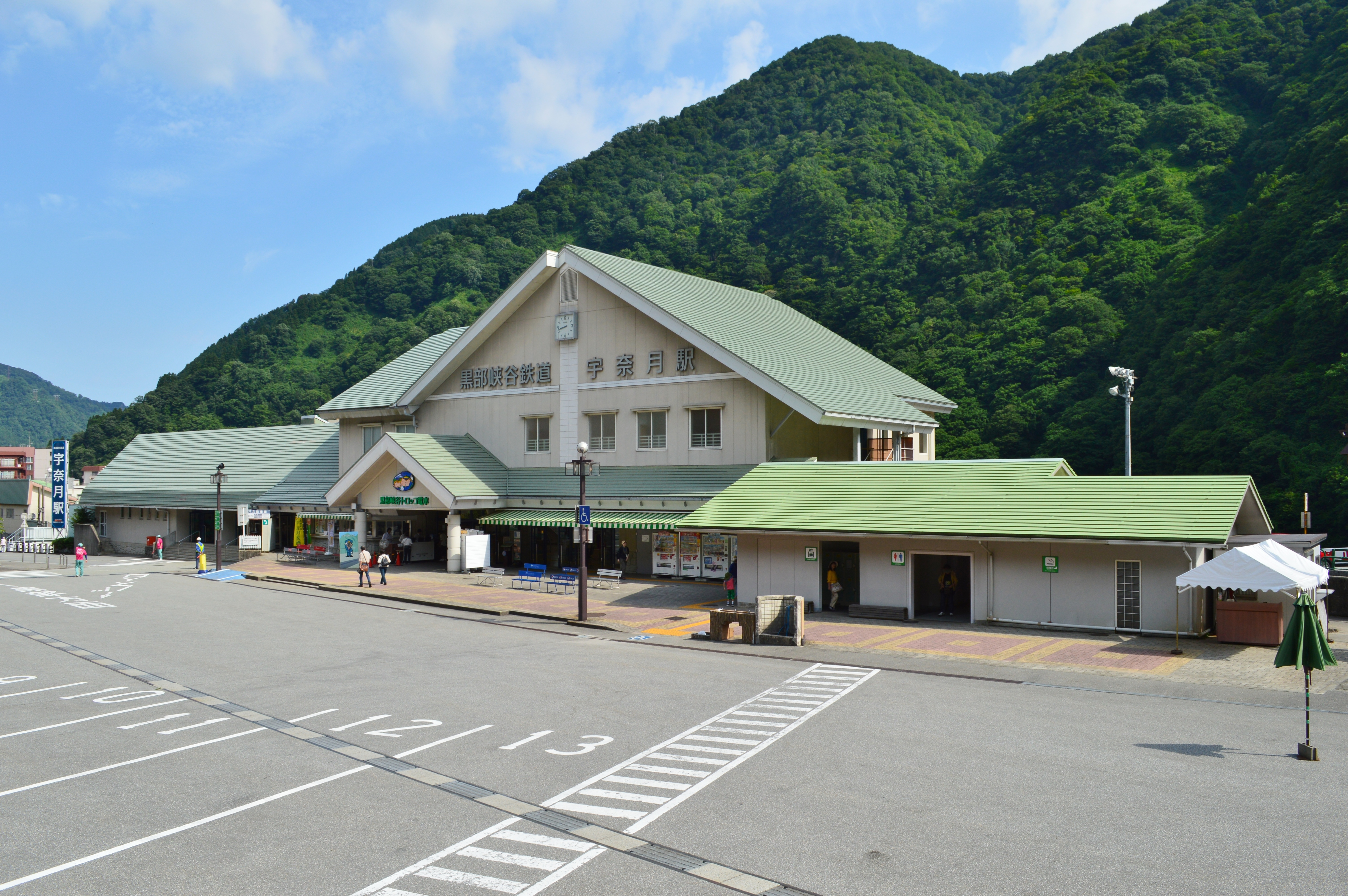 宇奈月駅 駅舎